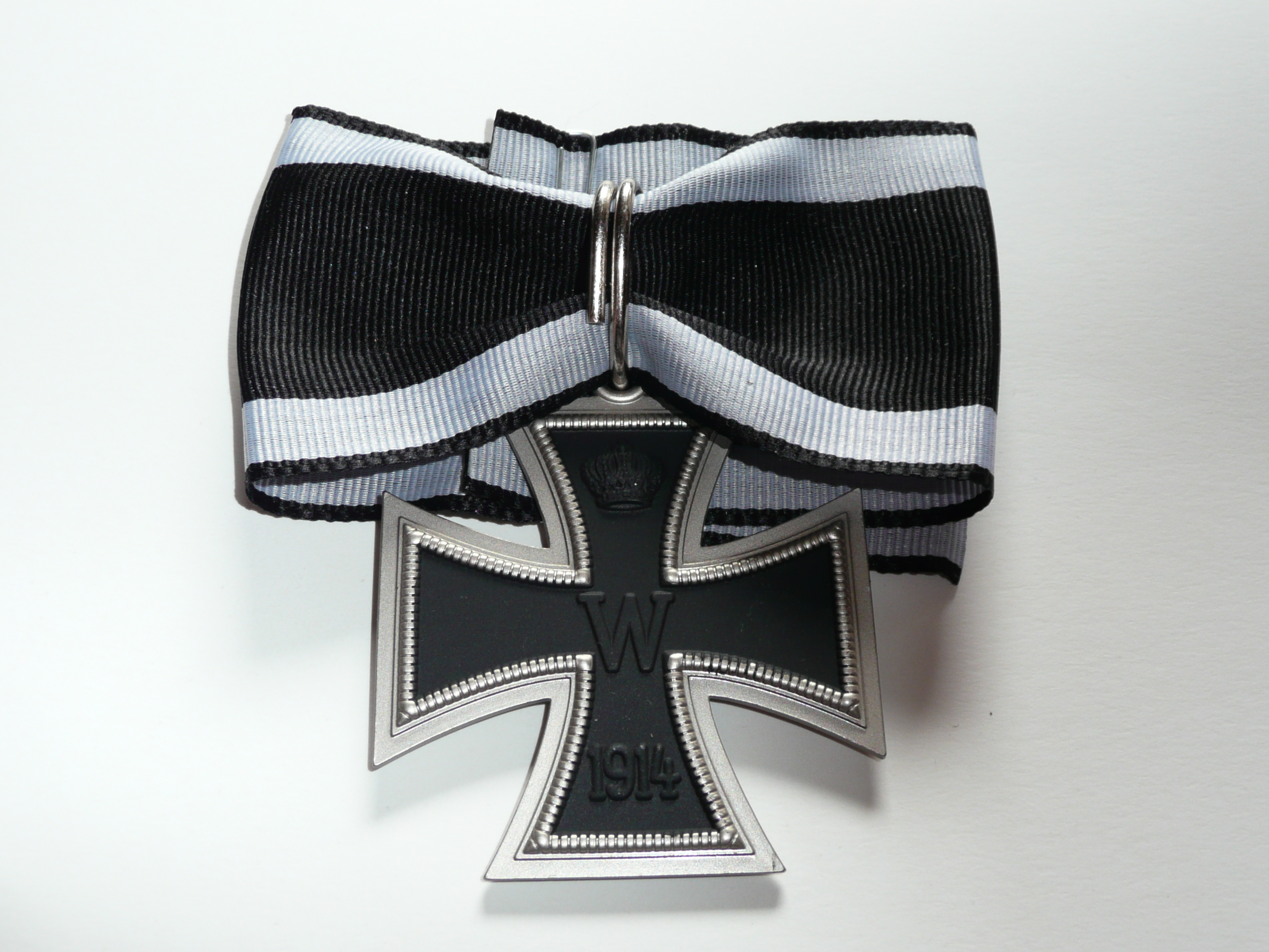 Replik des Grosskreuzes des Eisernen Kreuzes von 1914